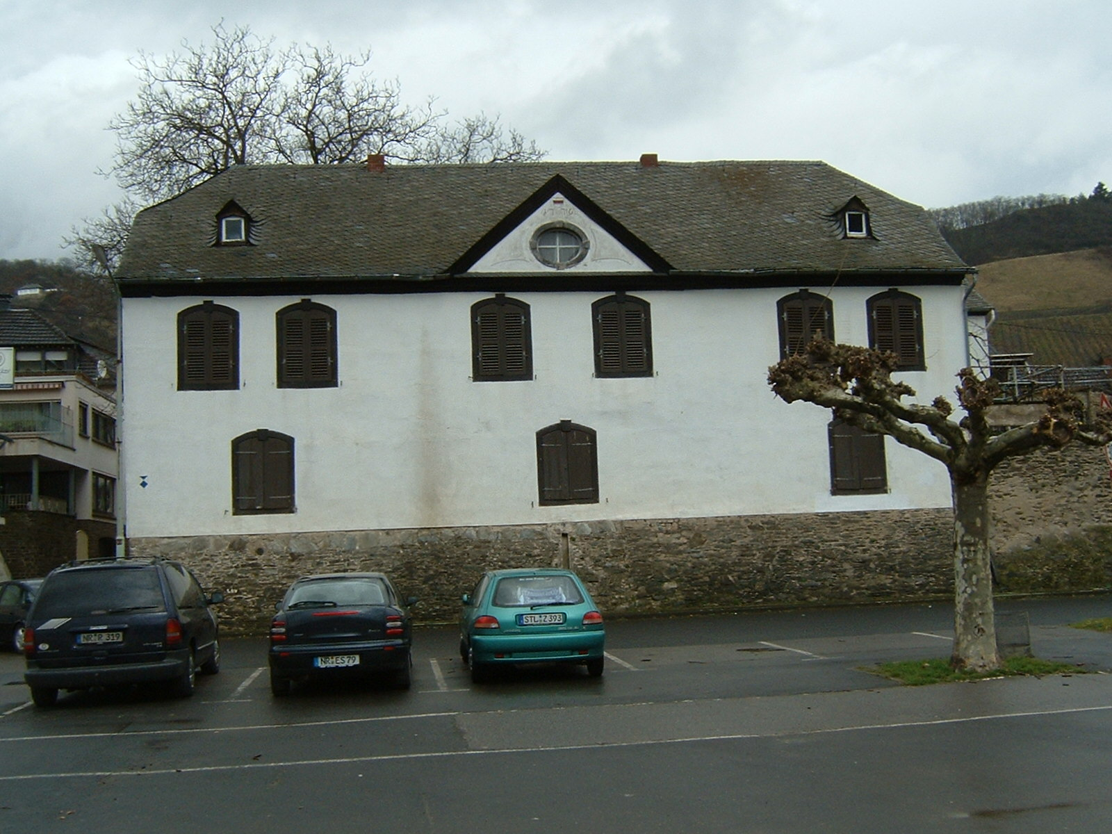 Fronhof an der Rheinstraße in Leutesdorf